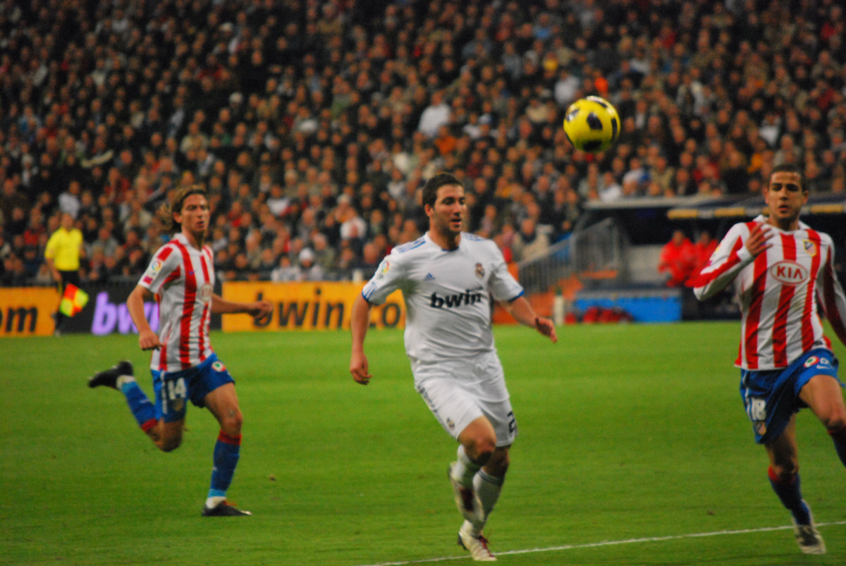 La Liga: Real Madrid 2 - Atletico 0 7 de Noviembre 2010